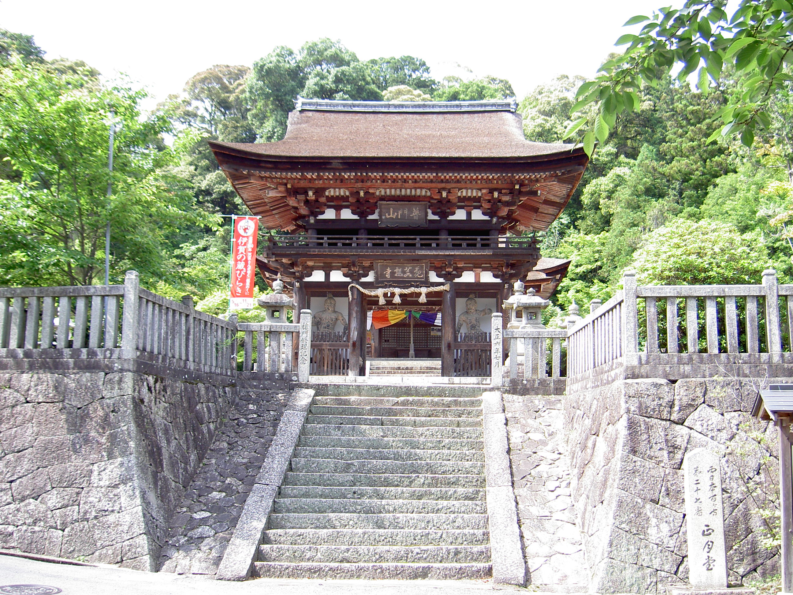 正月堂